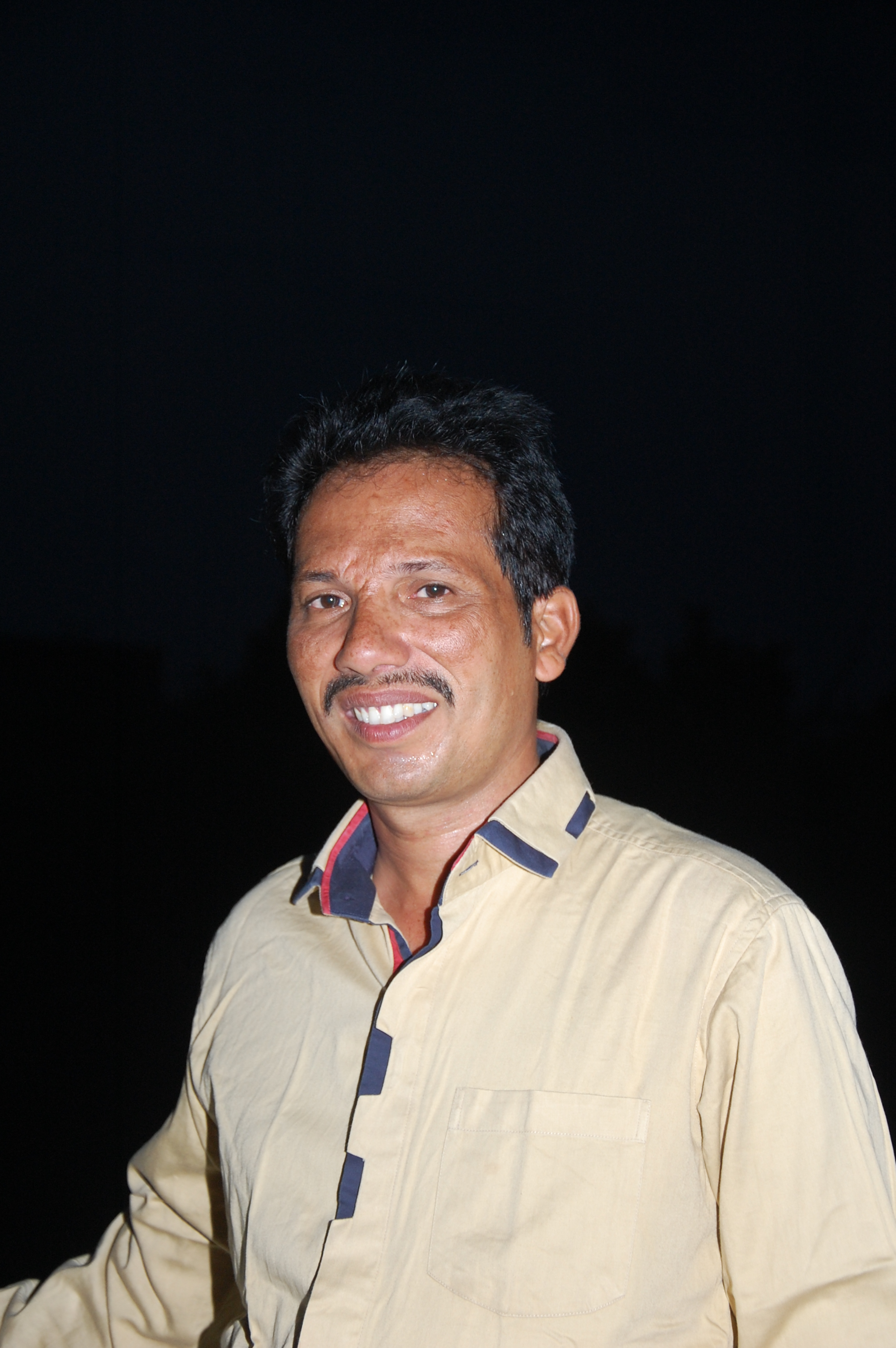 విలాసాగరం రవీందర్